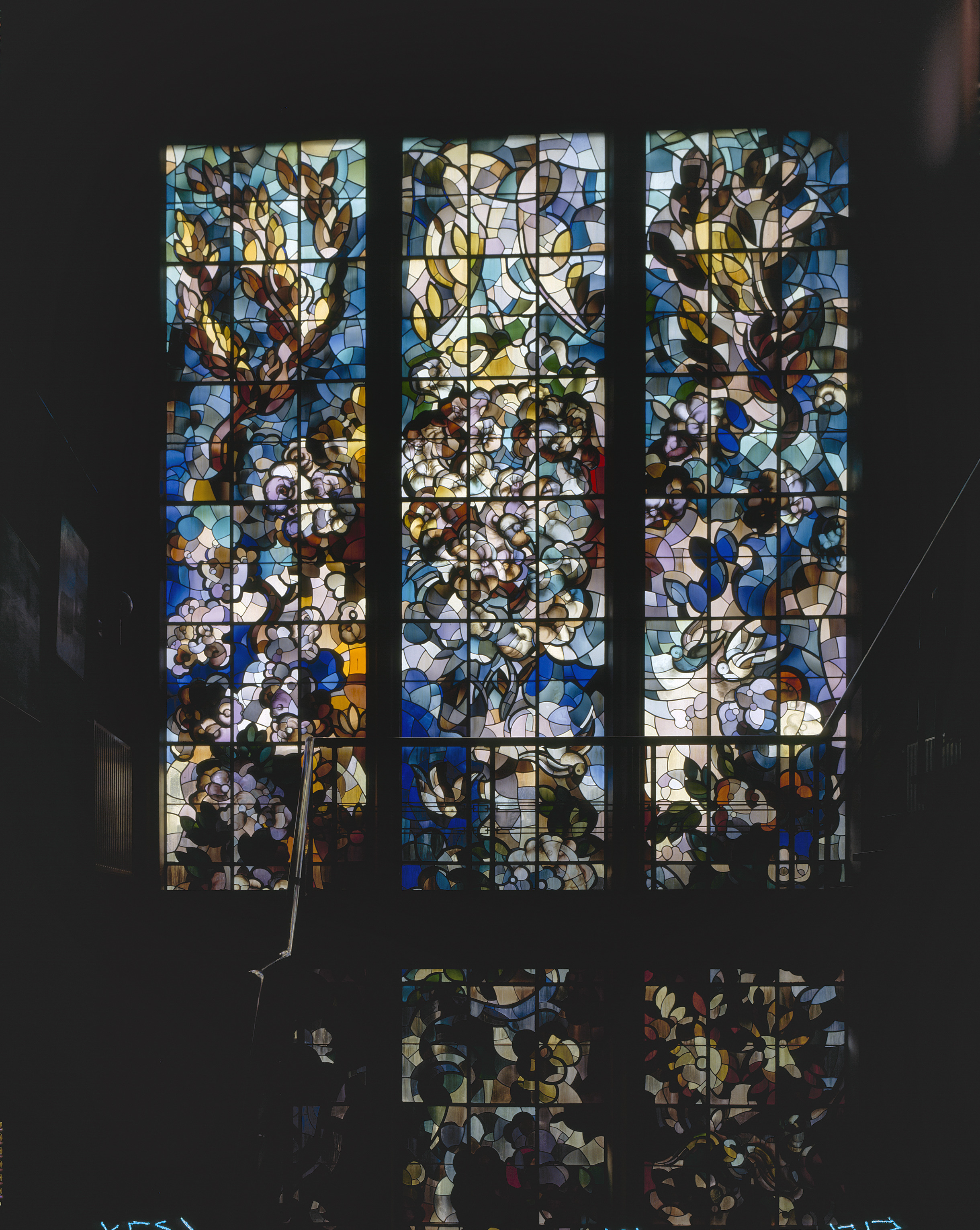 Valeriuskliniek: Interieur hal, aanzicht glas-in-loodraam (opmerking: Gefotografeerd voor Glas in lood in Nederland 1817-1968)